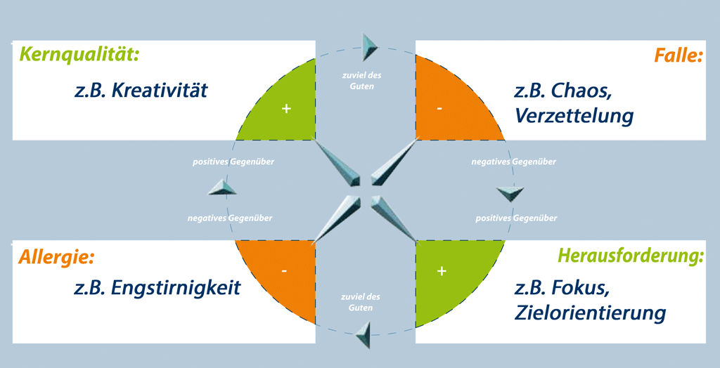 Beispiel eines Kernquadrat-Modells